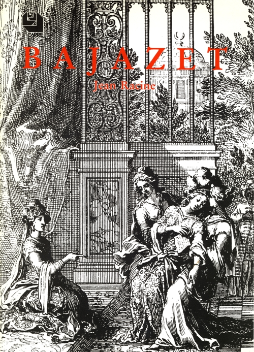 Bajazet - Programme original (Couverture / Cover) - Carré Silvia Monfort - Paris 1985